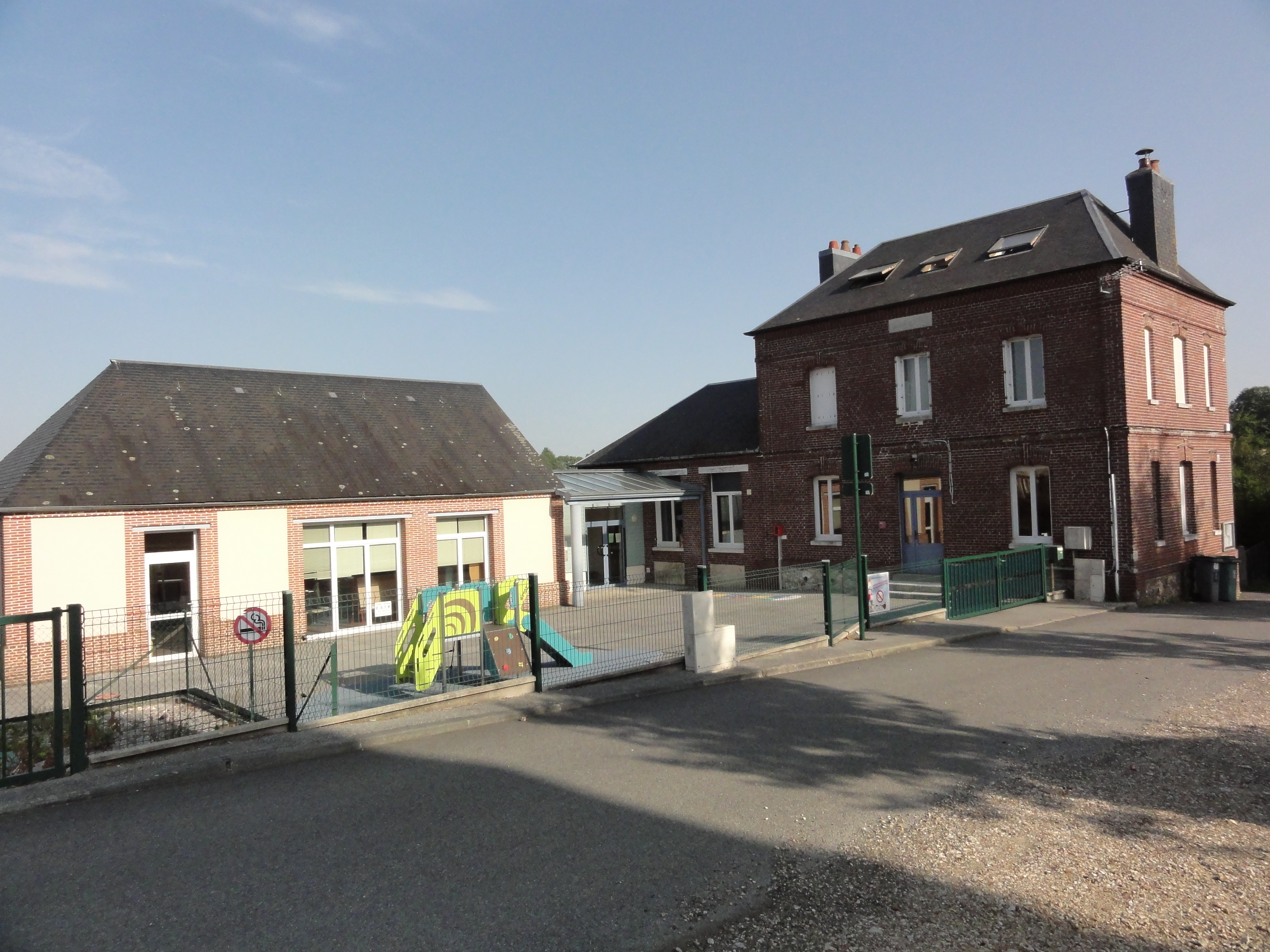 Saint-Gilles-de-Crétot (Seine-Mar.) école, ancienne mairie